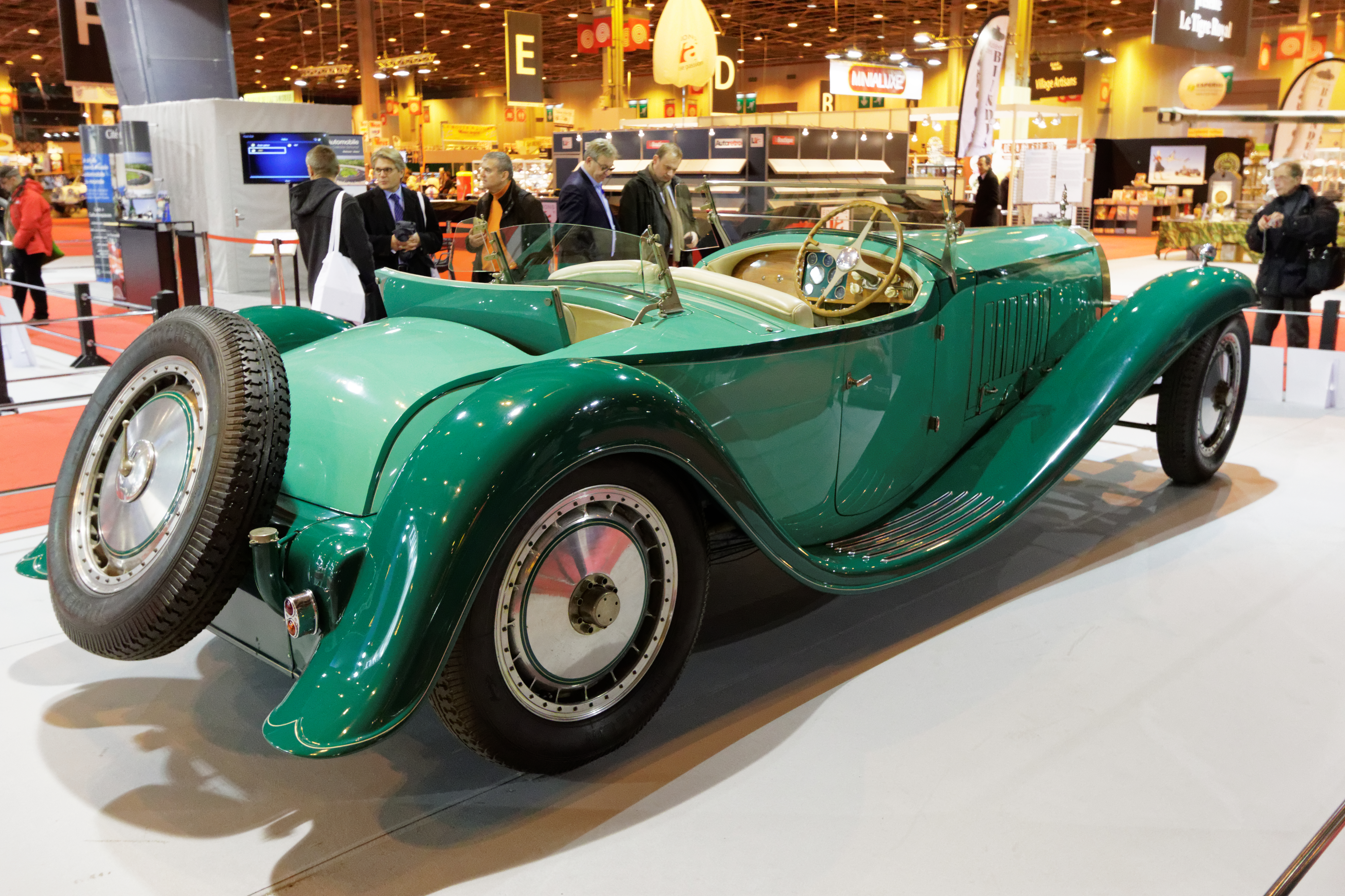 Une des voiture présentée lors du salon Rétromobile de Paris 2015